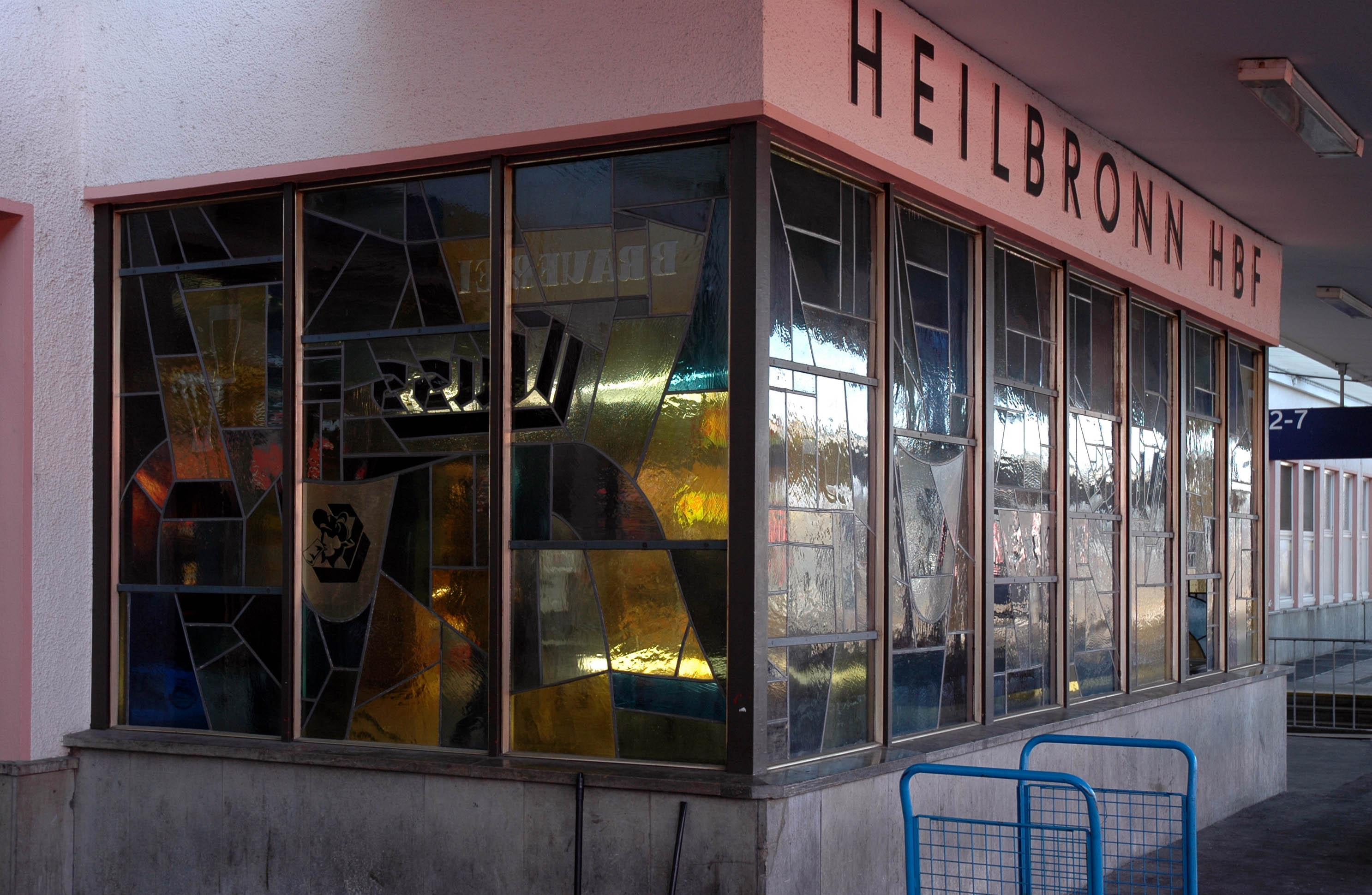 Buntglasfenster am Treppenabgang des Heilbronner Hauptbahnhofs mit Werbung für Bier der Marke Cluss.